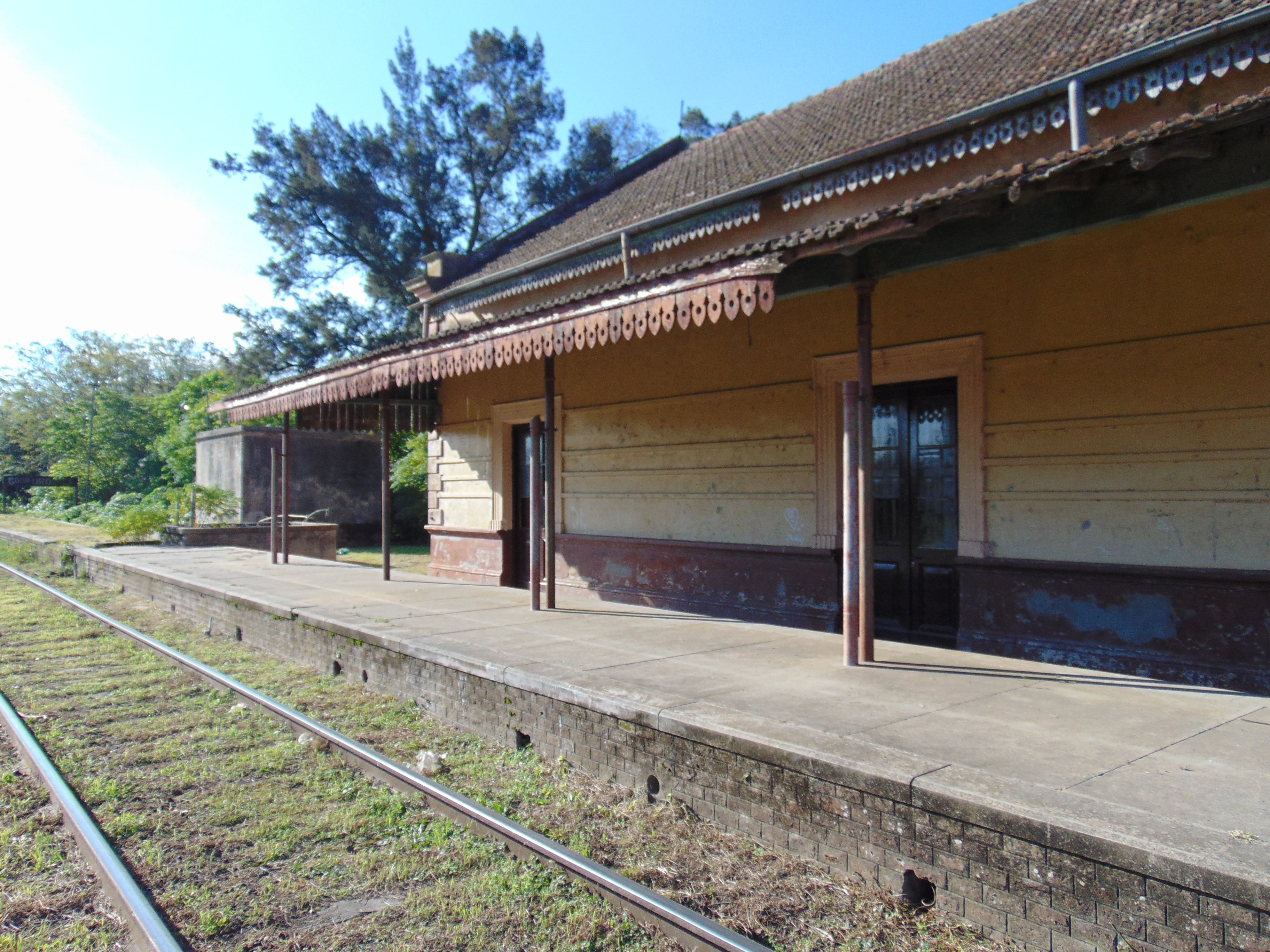 Estación Gdor. Urquiza en mayo 2018.